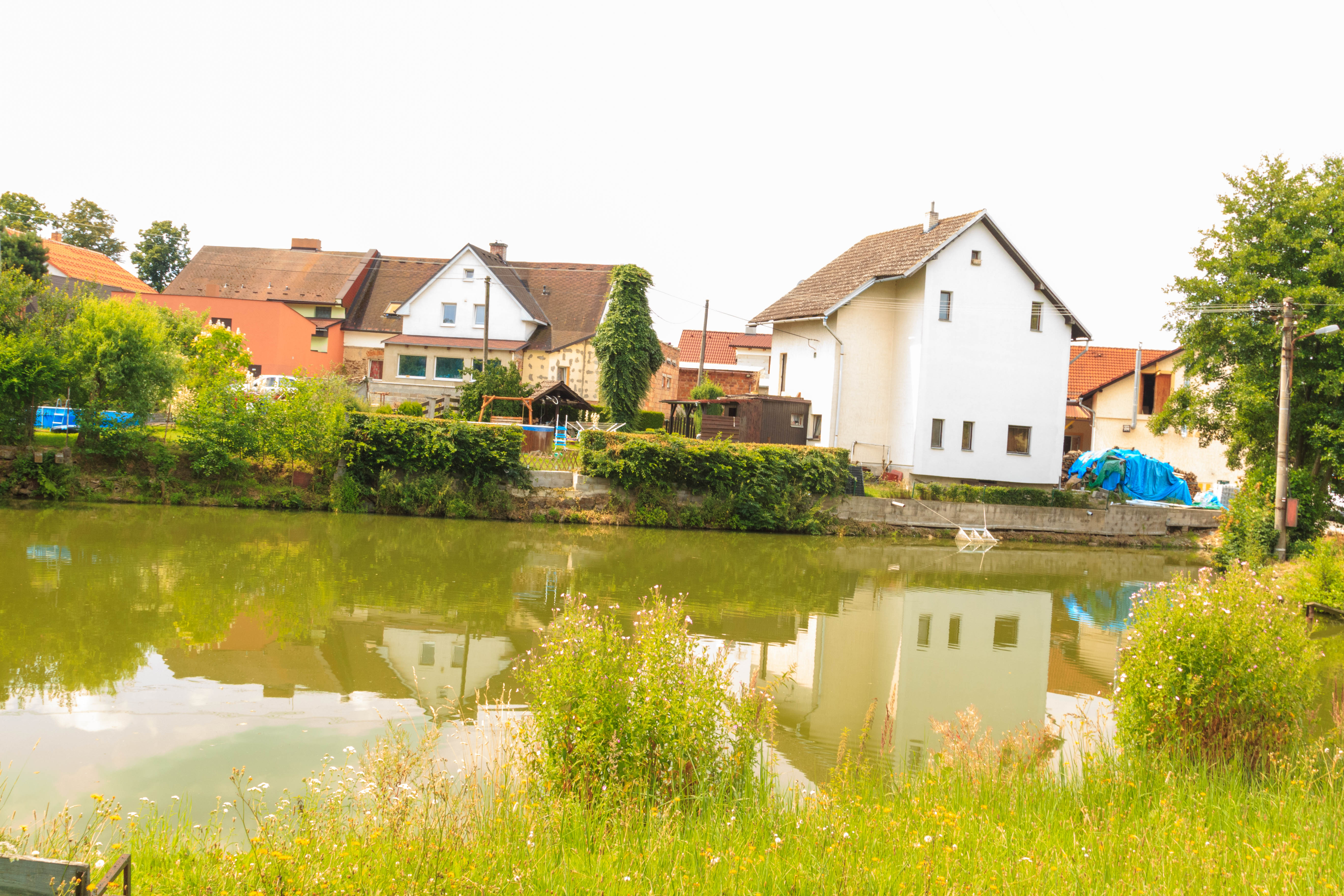 Termesivy rybníček.